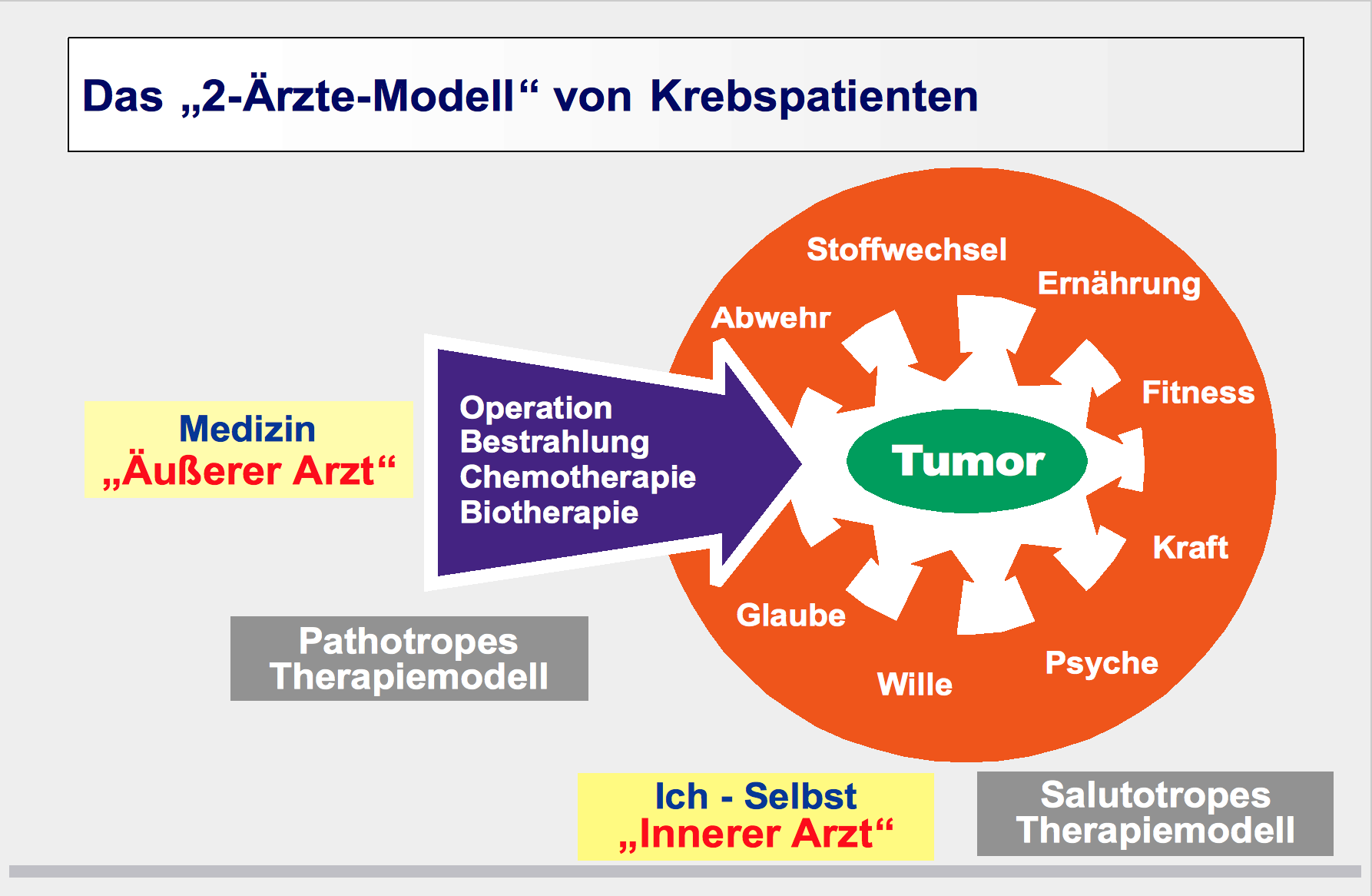 2 Aerzte Modell